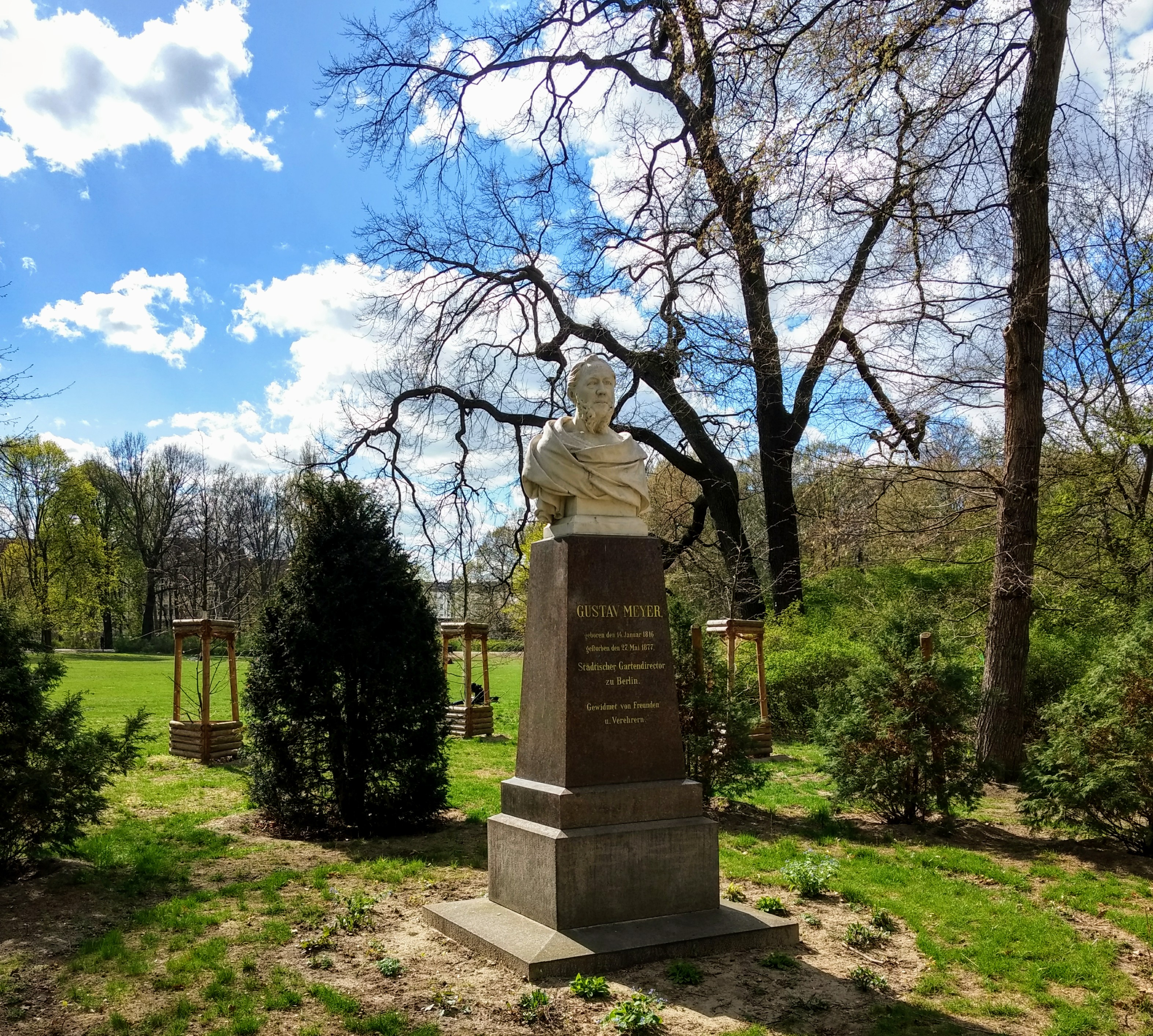 Gustav Meyer 1816-1877